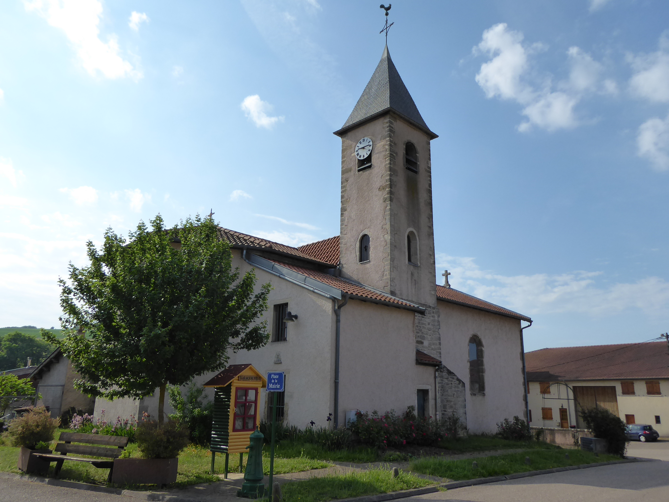 Église de l'Assomption (XVIIIème siècle) et sa tour romane du XIIème siècle à Agincourt près de Nancy en Lorraine.